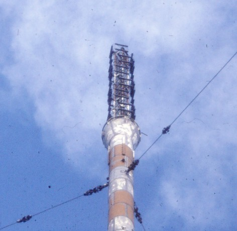 Foto av toppen på den ena masten med FM-antenner vid Östersunds Radiostation kort före rivning.